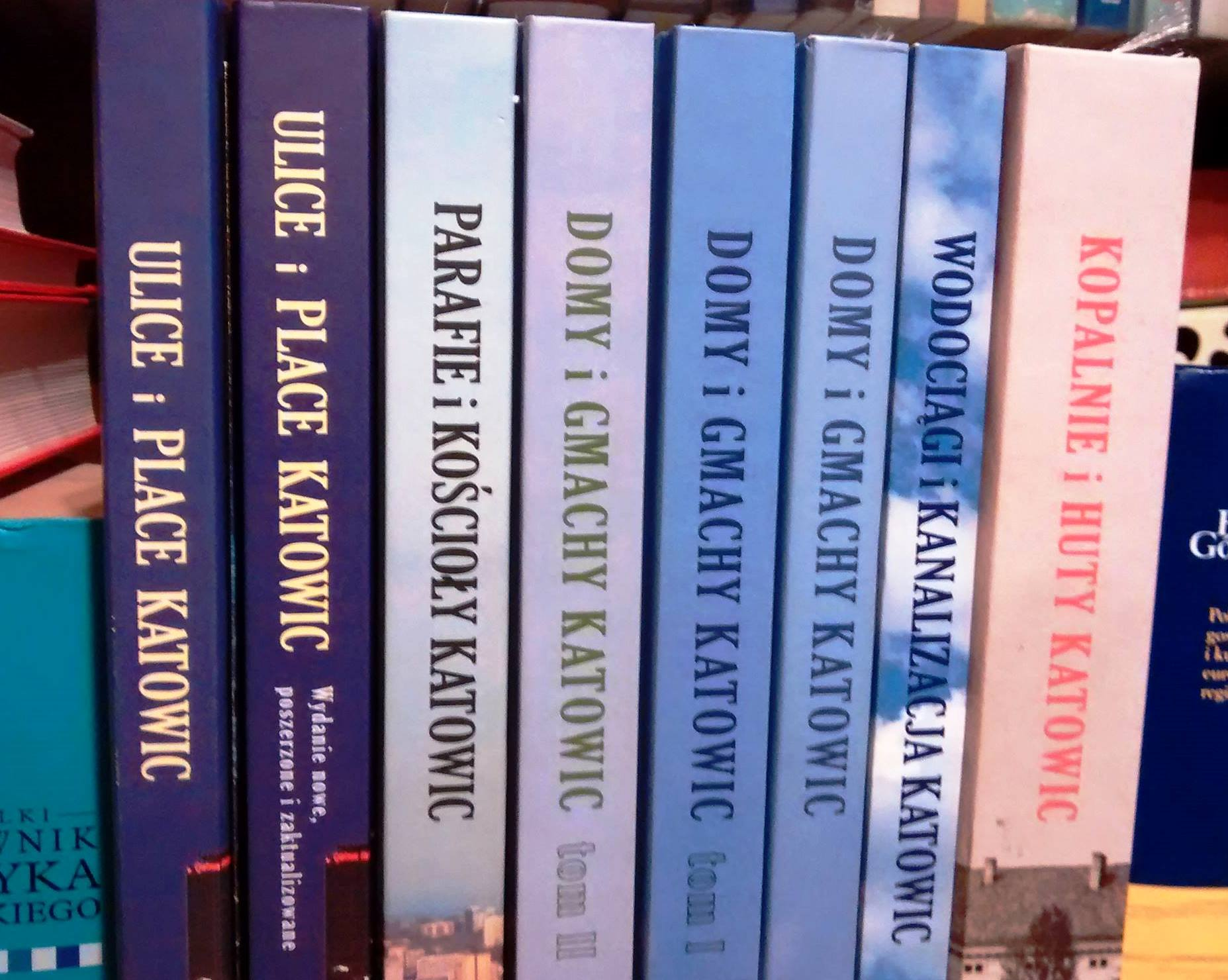 Książki wydawane przez Wydawnictwo „Prasa i Książka” - od lewej: Michał Bulsa, „Ulice i place Katowic”, wstęp Henryk Waniek, zdjęcia Piotr Tabaczyński, redakcja Grzegorz Grzegorek. Katowice: Wydawnictwo Prasa i Książka Grzegorz Grzegorek, 2012. ISBN 978-83-933-665-8-3. Michał Bulsa, „Ulice i place Katowic” - wydanie 2 (nowe, poszerzone i zaktualizowane), wstęp Henryk Waniek, zdjęcia Piotr Tabaczyński, redakcja Grzegorz Grzegorek. Katowice: Wydawnictwo Prasa i Książka Grzegorz Grzegorek, 2015. ISBN 978-83-63780-10-4. Grzegorz Grzegorek, „Parafie i kościoły Katowic”, wstęp abp Wiktor Skworc, zdjęcia Piotr Tabaczyński. Katowice: Wydawnictwo Prasa i Książka Grzegorz Grzegorek, 2014. ISBN 978-83-63780-06-7. Michał Bulsa, Grzegorz Grzegorek, Beata Witaszczyk, „Domy i gmachy Katowic”, tom 2, wstęp Henryk Waniek, zdjęcia Piotr Tabaczyński. Katowice: Wydawnictwo Prasa i Książka Grzegorz Grzegorek, 2016. ISBN 978-83-63780-15-9. Michał Bulsa, Grzegorz Grzegorek, Beata Witaszczyk, „Domy i gmachy Katowic”, tom 1 (wyd. 2. zaktualizowane), wstęp Henryk Waniek, zdjęcia Piotr Tabaczyński. Katowice: Wydawnictwo Prasa i Książka Grzegorz Grzegorek, 2015. ISBN 978-83-63780-15-9. Michał Bulsa, Grzegorz Grzegorek, Beata Witaszczyk, „Domy i gmachy Katowic”, wstęp Henryk Waniek, zdjęcia Piotr Tabaczyński. Katowice: Wydawnictwo Prasa i Książka Grzegorz Grzegorek, 2013. ISBN 978-83-63780-00-5. Jan Psiuk, Przemysław Nadolski, Grzegorz Grzegorek, „Wodociągi i kanalizacja Katowic”, wstęp Leszek Jodliński, zdjęcia Beata Witaszczyk. Katowice: Wydawnictwo Prasa i Książka Grzegorz Grzegorek, 2016. ISBN 978-83-63780-08-1. Adam Frużyński, Piotr Rygus, Grzegorz Grzegorek: „Kopalnie i huty Katowic”. wstęp Leszek Jodliński. Katowice: Wydawnictwo Prasa i Książka Grzegorz Grzegorek, 2017. ISBN 978-83-63780-23-4.